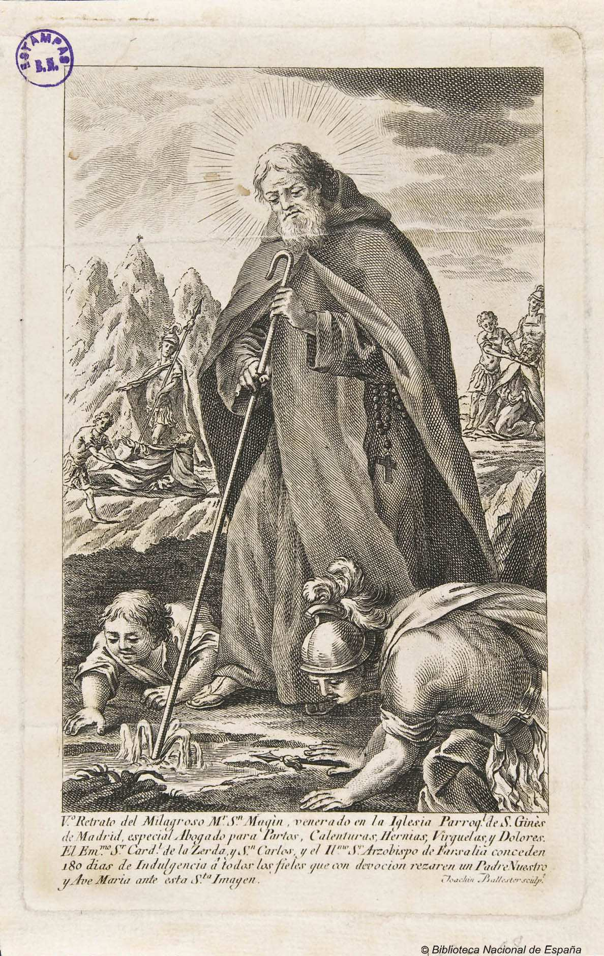 San Magín, buril. Inscripción: "V.º Retrato del Milagroso M.r S.n Magín venerado en la Iglesia Parroql de S. Ginés de Madrid, especial Abogado para Partos, Calenturas, Hernias, Virguelas y Dolores"